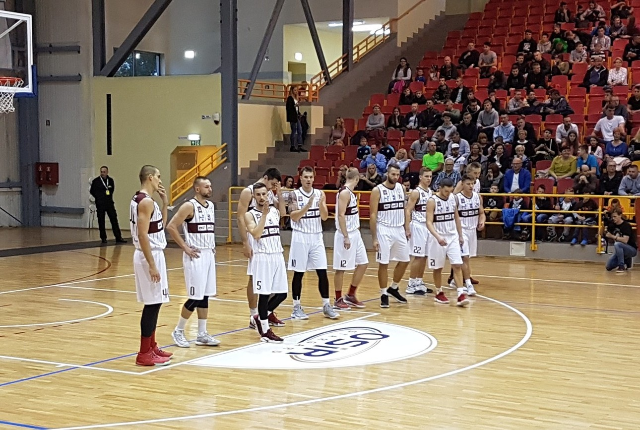 Inauguracja sezonu 2017-2018. Spójnia Stargard ze Zniczem Pruszków